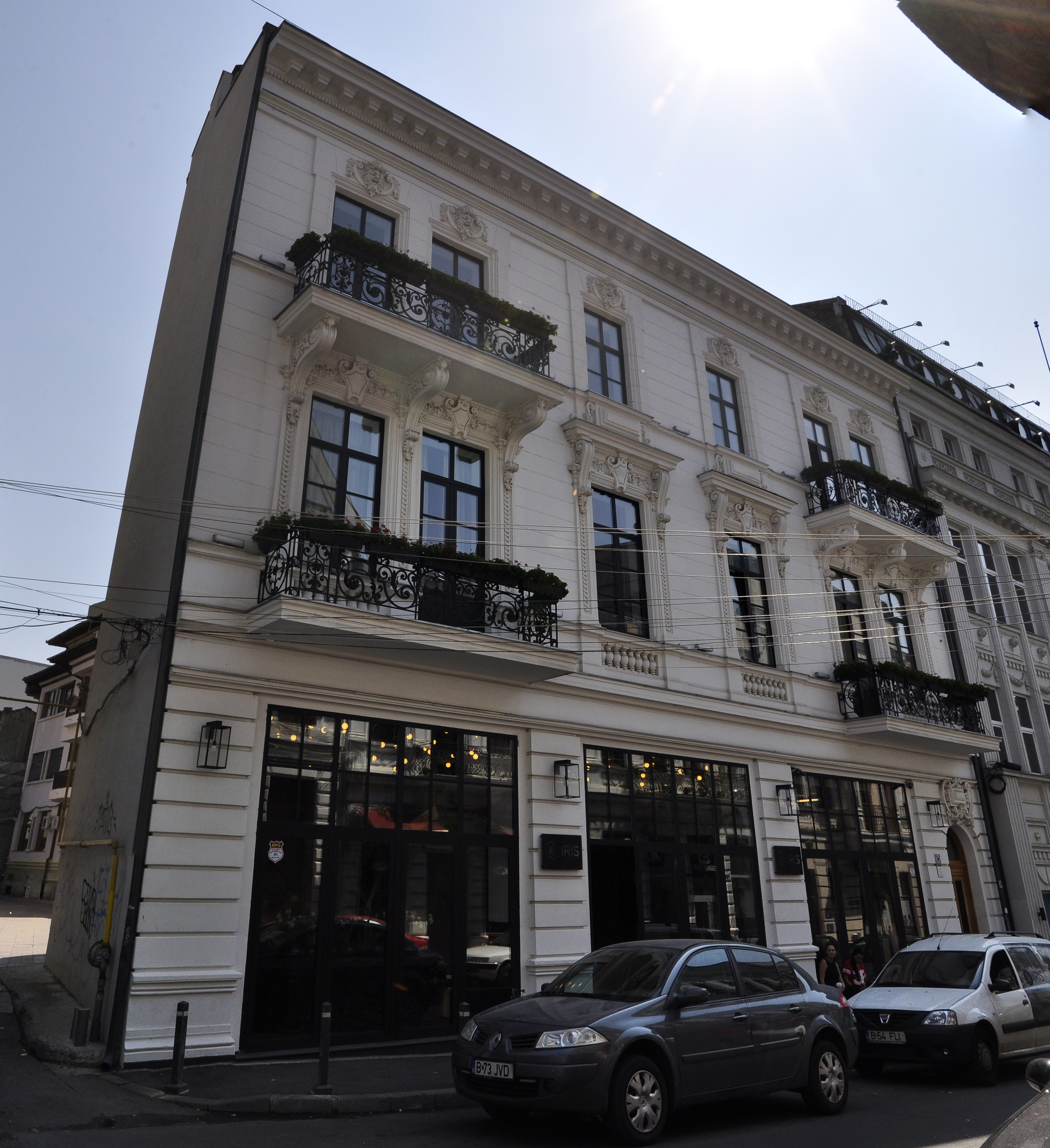 Casă Calea Moșilor 34